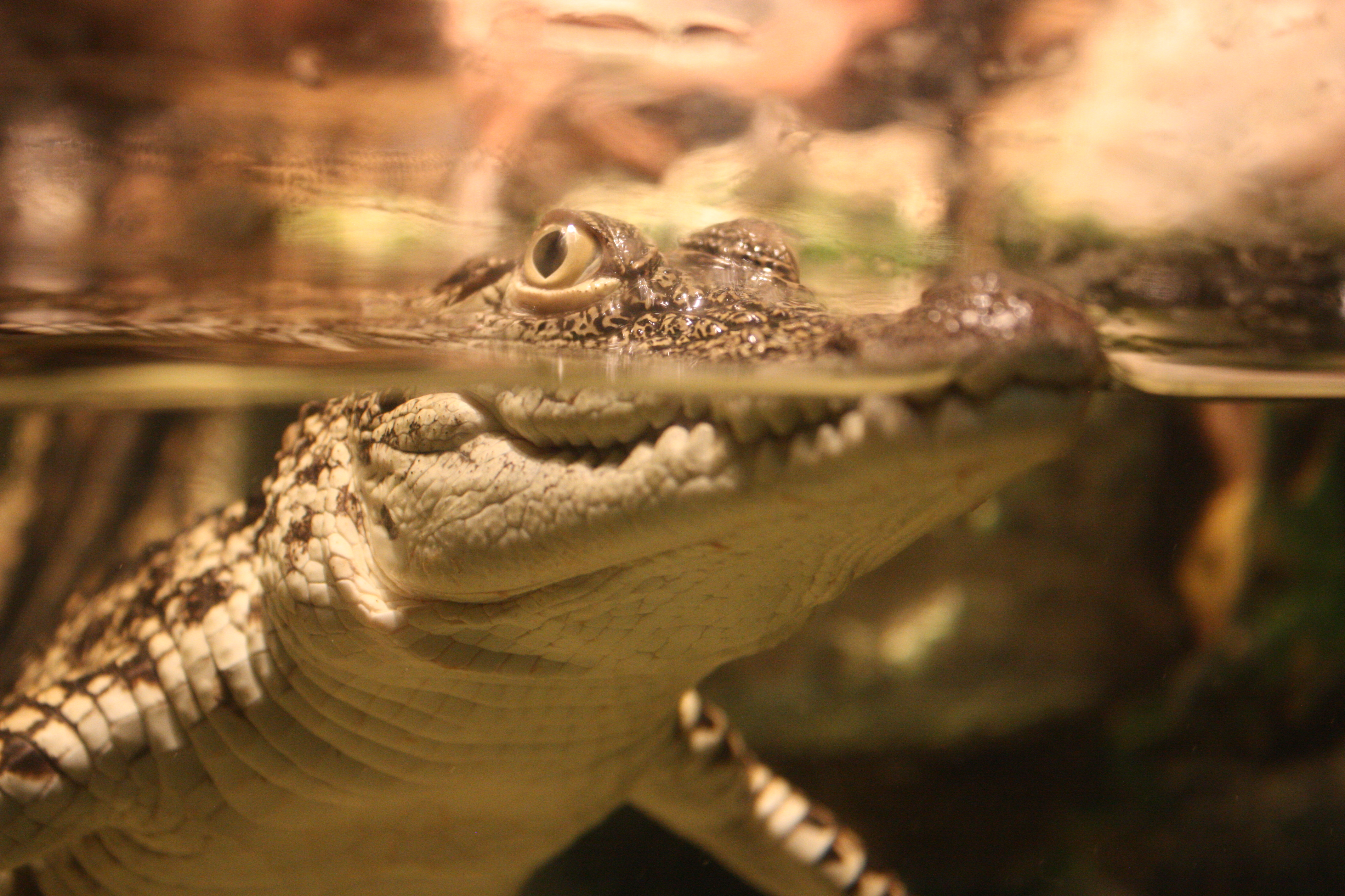 תנין [Crocodylus] בתמונה מצולם תנין צעיר יחד עם כמה תנינים שהיו באקווריום. התמונה צולמה באקווריום התנינים במצפה התת ימי באילת באוגוסט 2017.